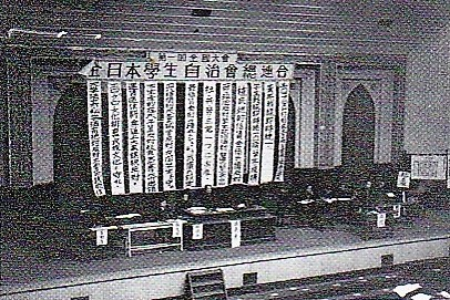 第一回全日本学生自治会総連合大会 於・中央大学